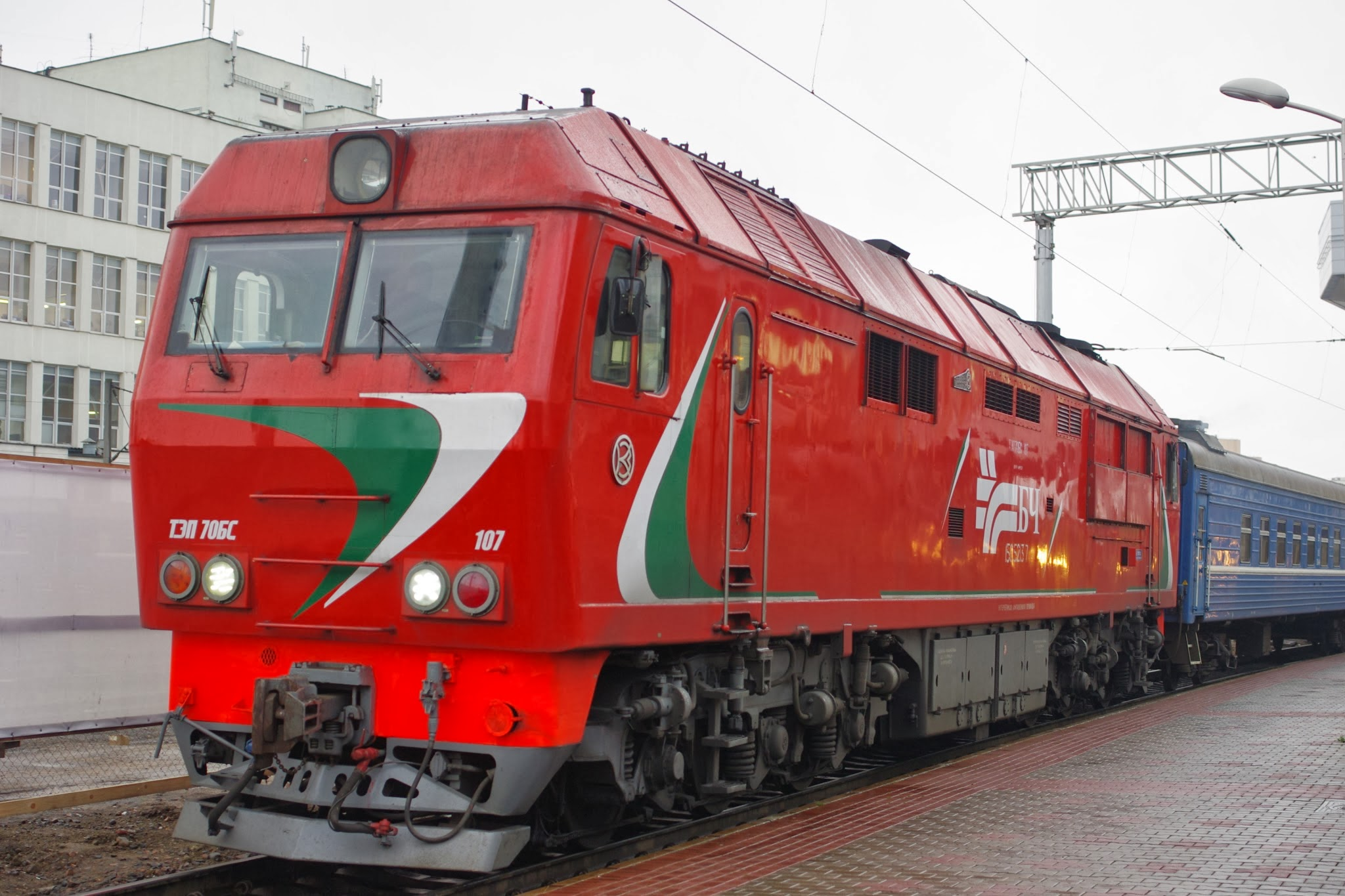 Kastryčnicki Raion, Minsk, Belarus